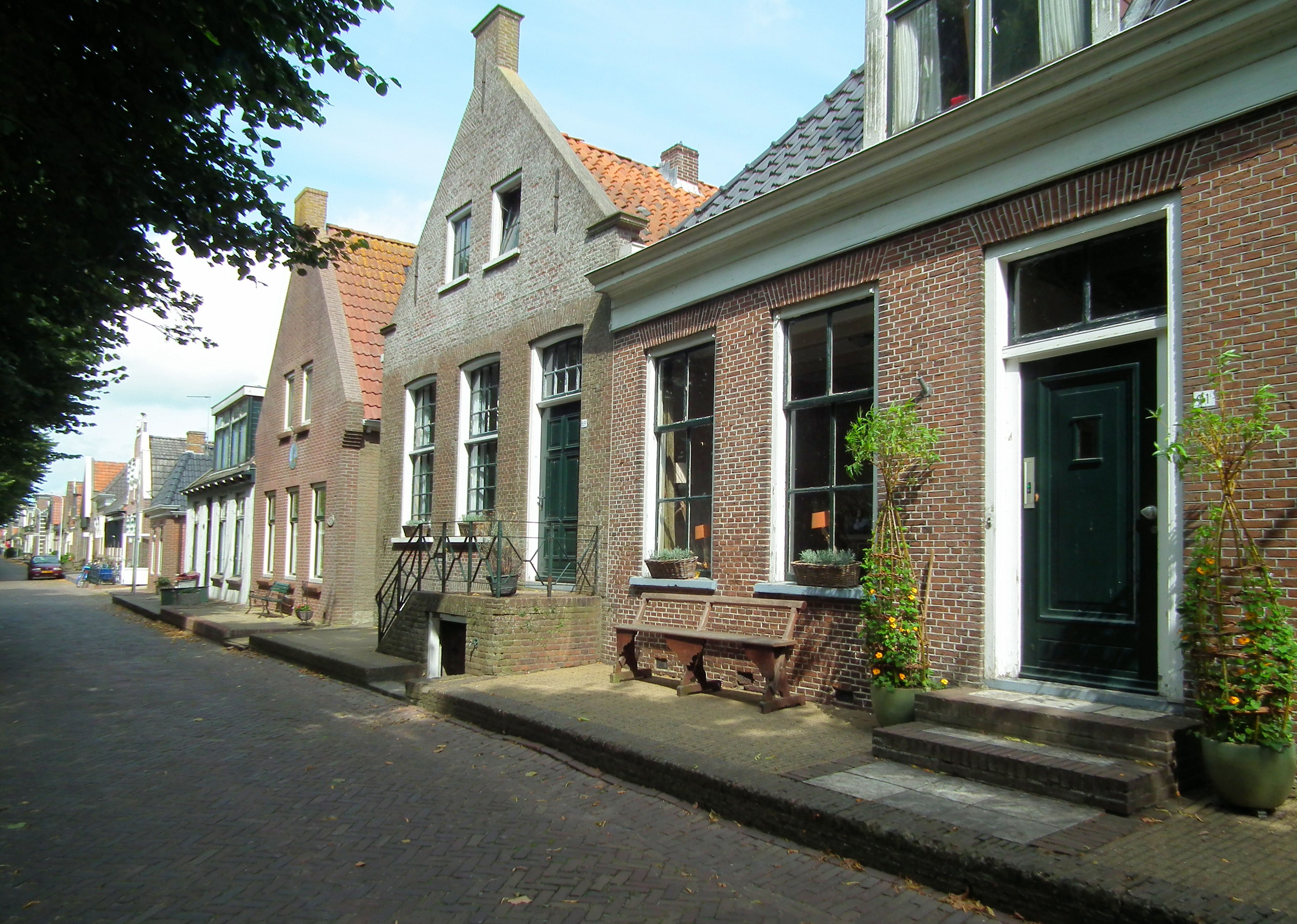 Nederland - Friesland - Stavoren - Stavoren is Hanzestad en Frieslands oudste stad. Pittoreske grachtjes. Een aantal fraaie panden.